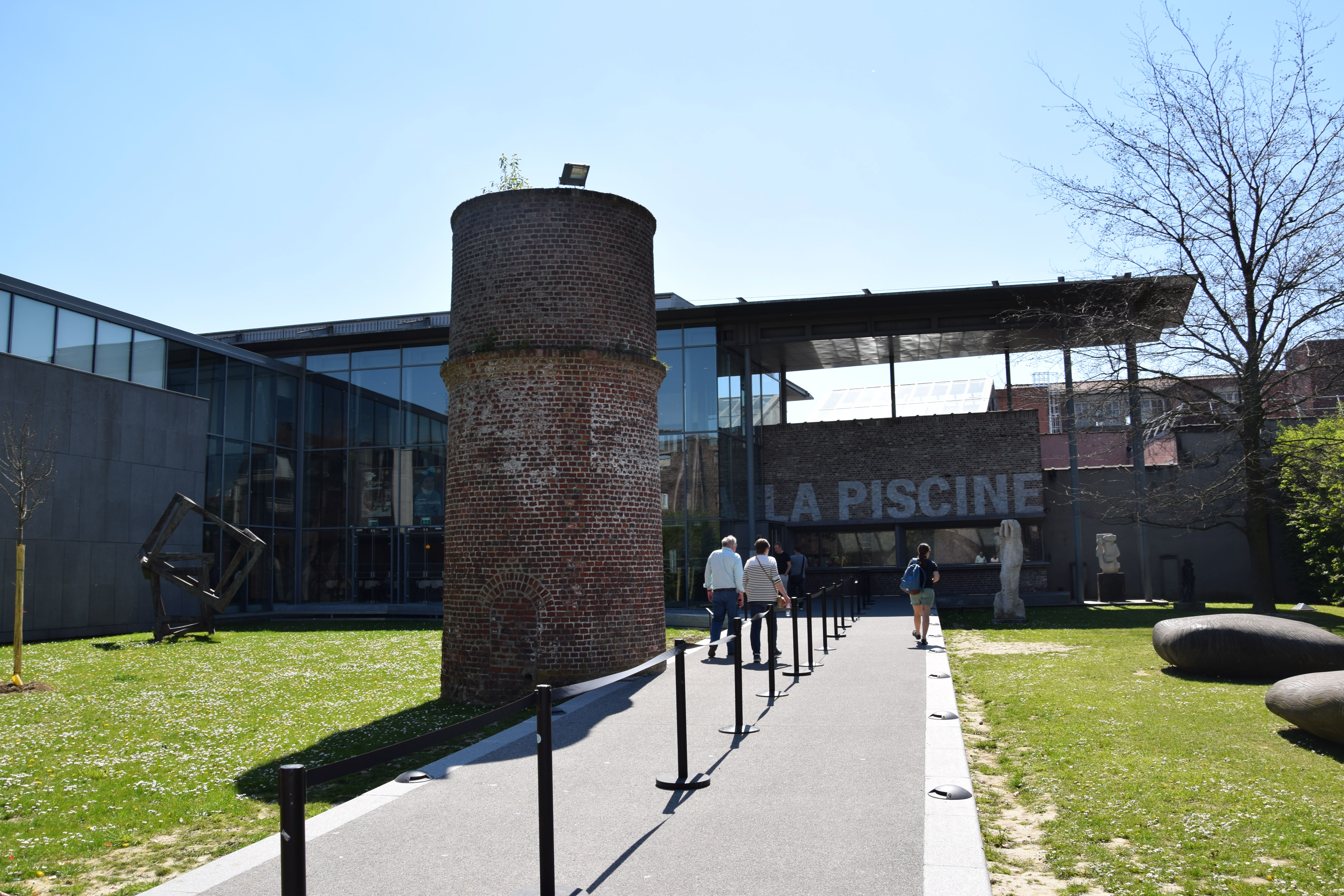 Interior of Musée d'Art et d'Industrie de Roubaix